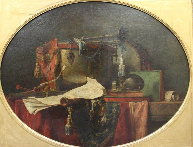 Pendant of File:Chardin attributs musique civile.jpg